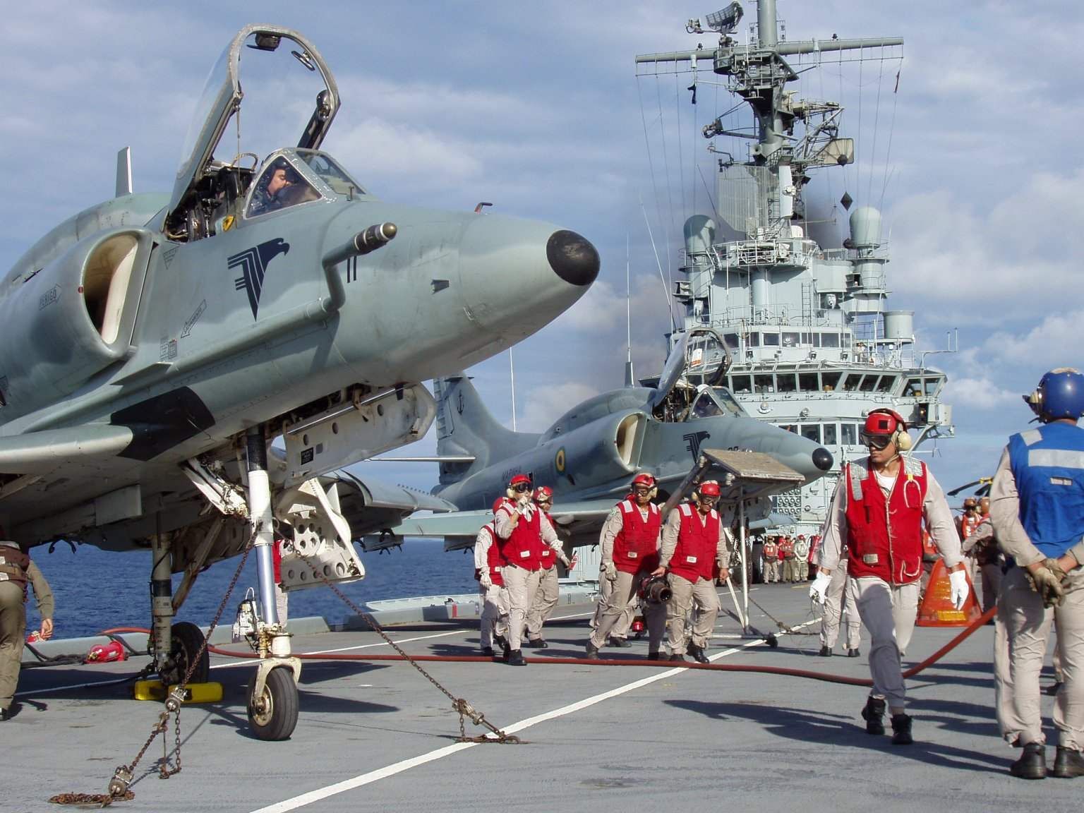 Arquivo liberado pela Marinha do Brasil através de projeto GLAM com Wiki Educação Brasil